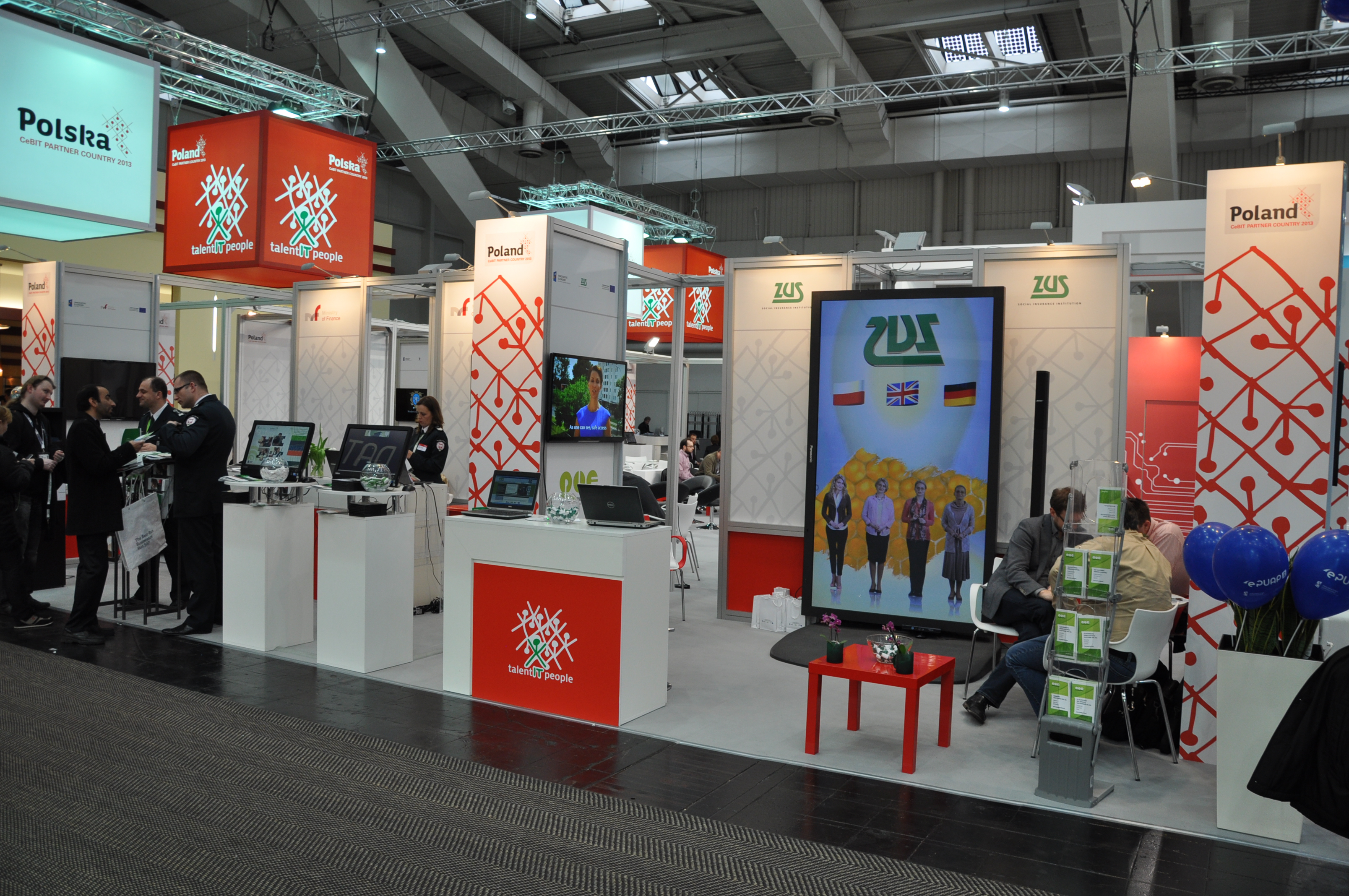 Cebit_1_28